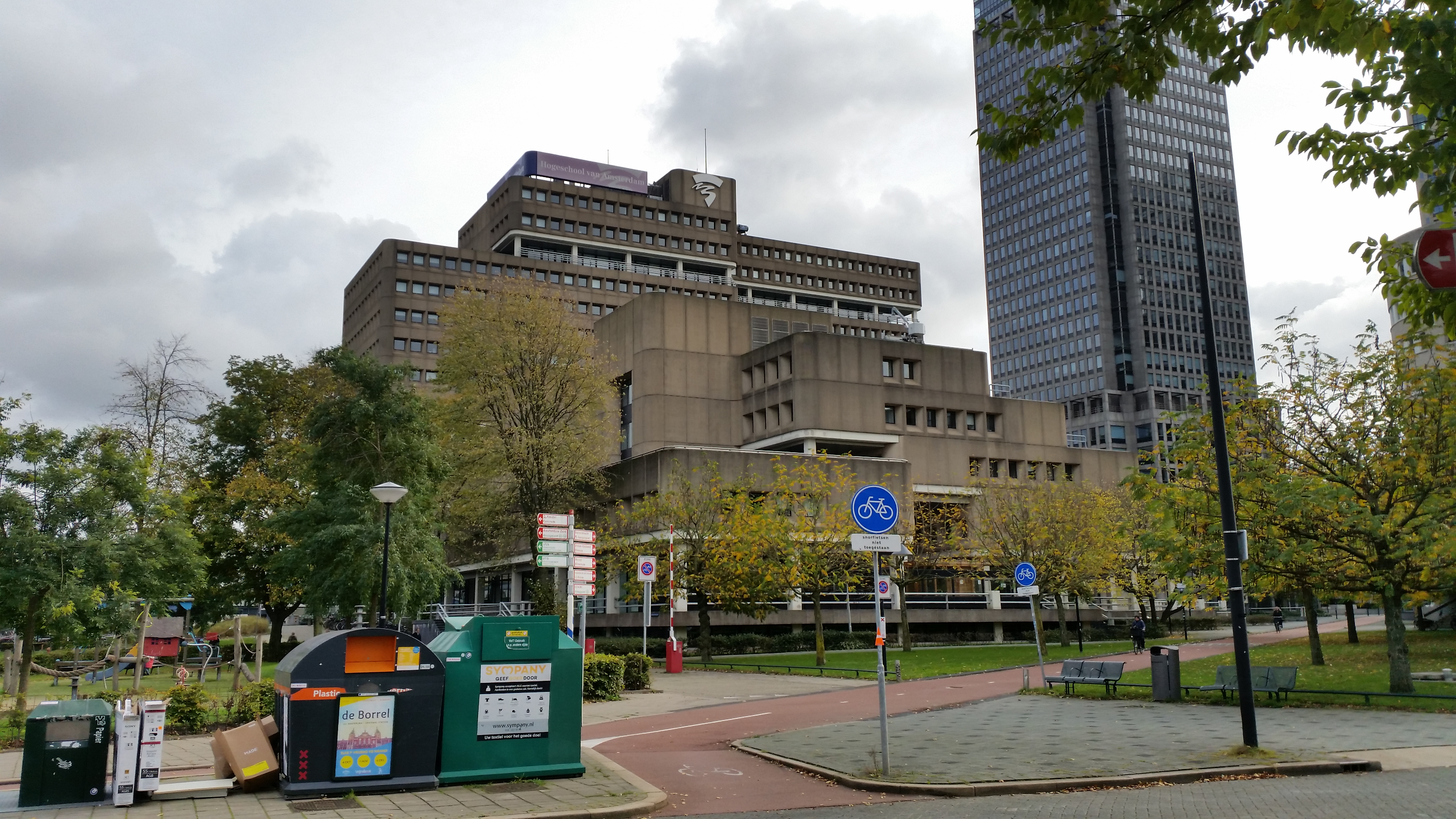 Weesperzijde 190, Amsterdam met Rembrandt tower